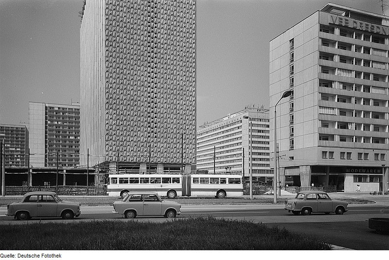 Original image description from the Deutsche FotothekDresden. Hotel Newa